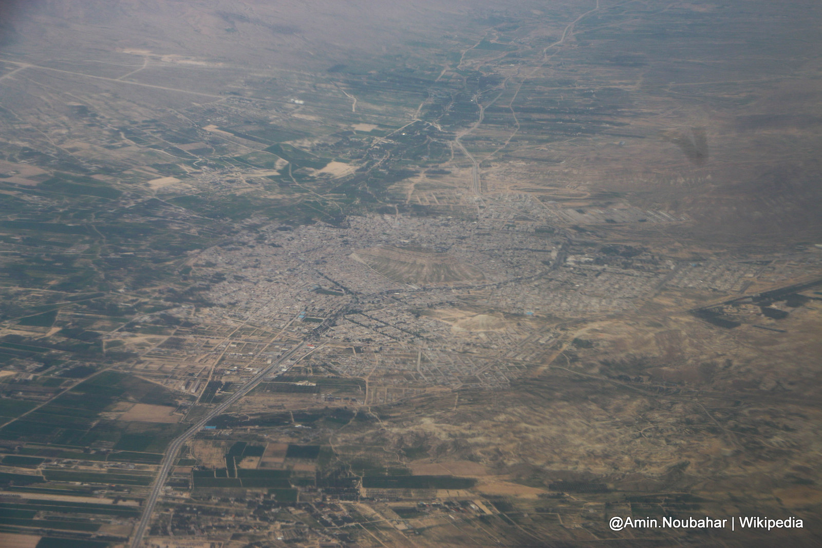 عکس از محمدامین نوبهار